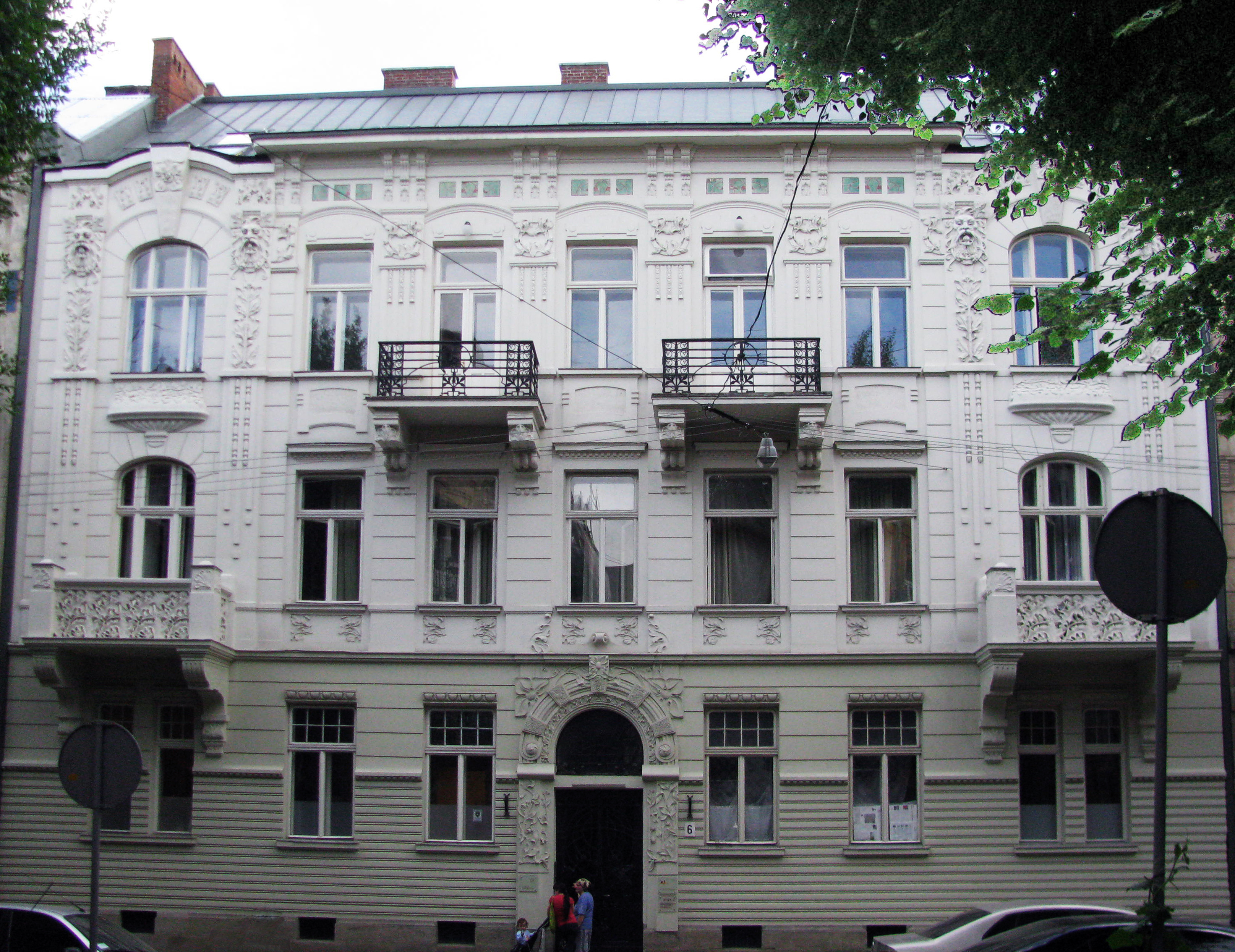 Будинок по вулиці Богомольця, 6 (Львів). Фасад. Запроектований архітектурно-будівничим бюро Івана Левинського. Архітектор Тадеуш Обмінський (1874-1932)